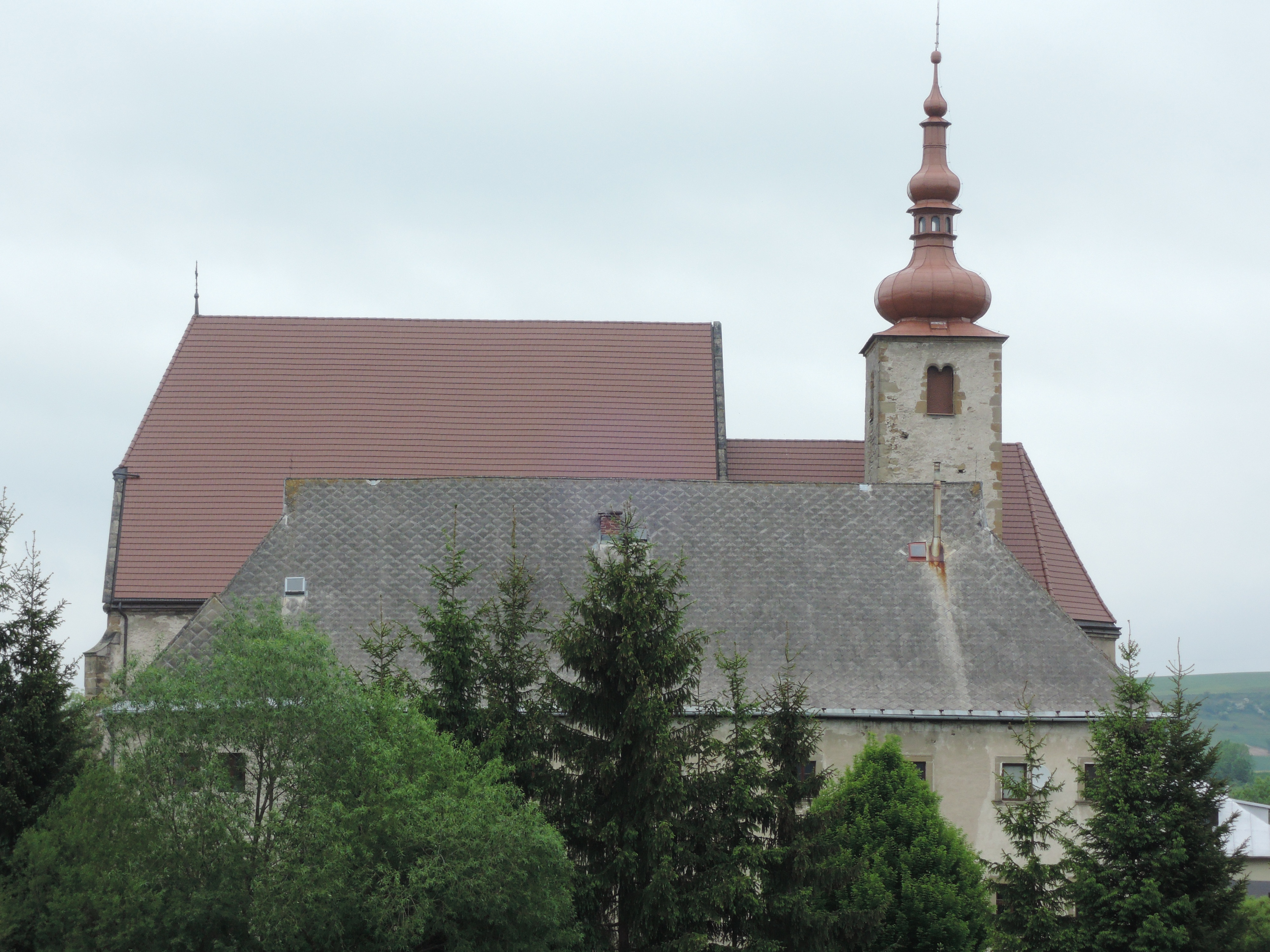 južný pohľad